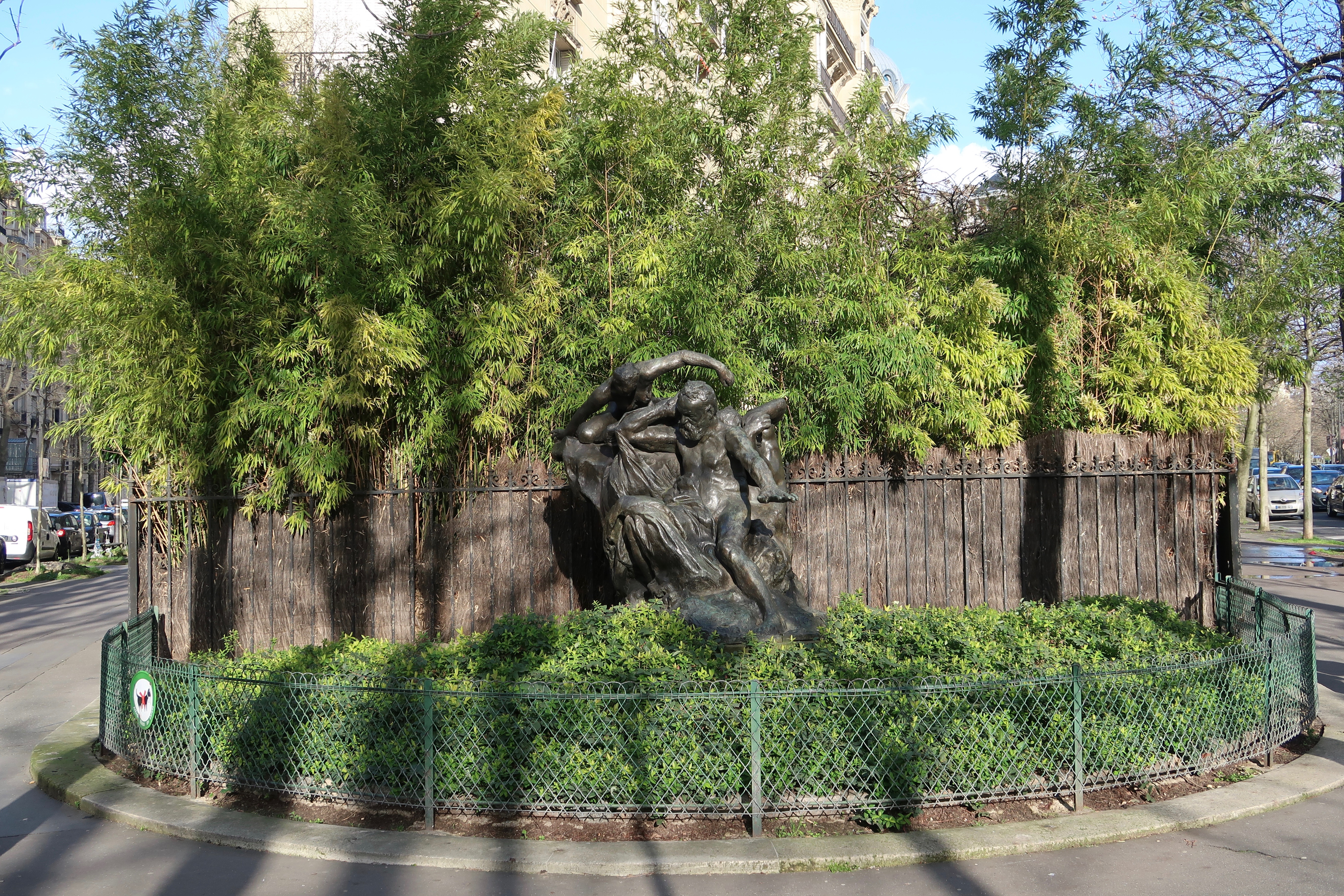 Victor Hugo et les Muses (1909), angle de l'avenue Victor-Hugo et de l'avenue Henri-Martin, Paris 16e. Statue en bronze par Auguste Rodin (1840-1917). Une autre version de la même statue se trouve dans le jardin du musée Rodin.